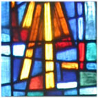 Vitraux de l'église de Troche (fragment)